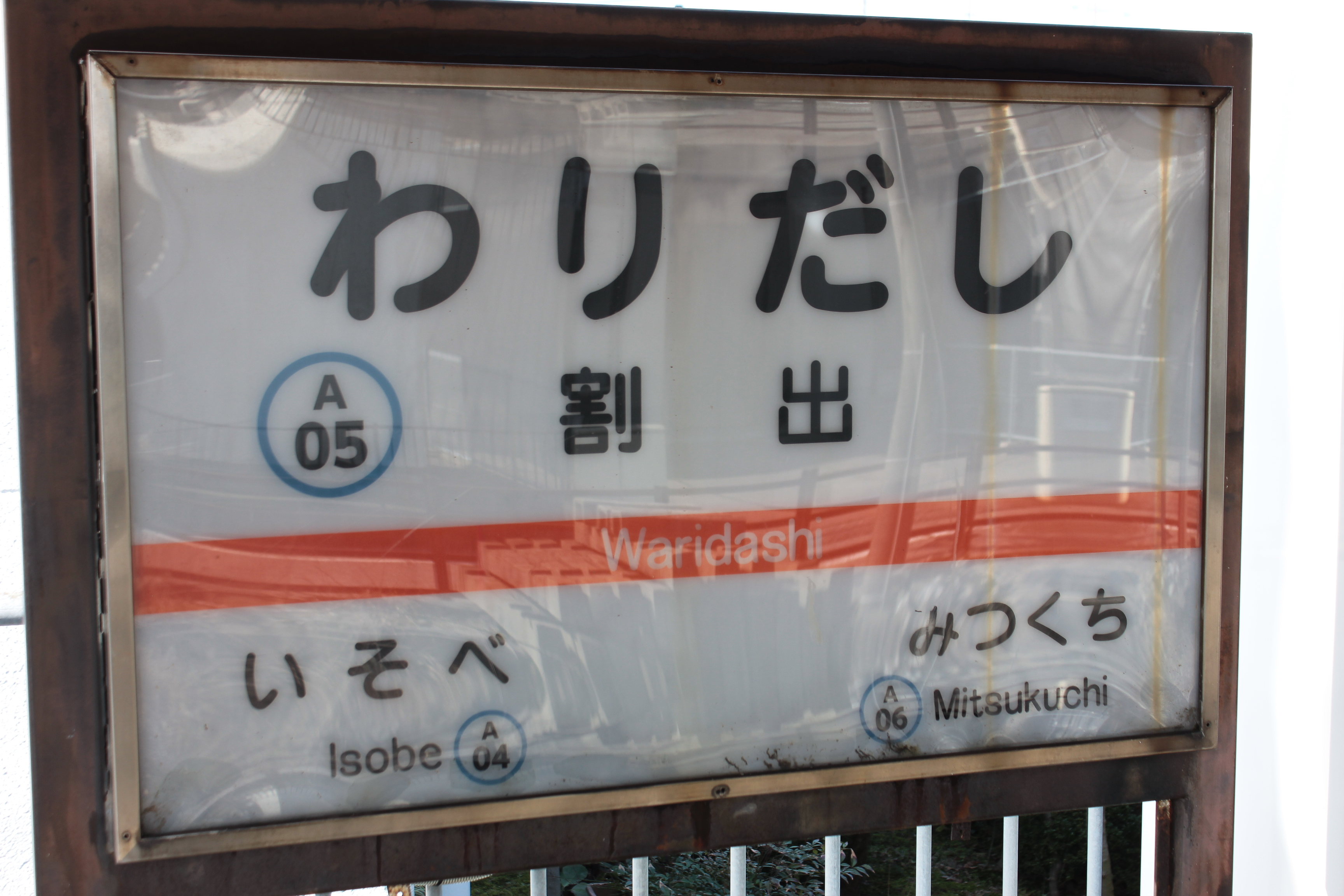 北陸鉄道浅野川線割出駅の駅名標。駅ナンバリングに対応している。 Canon EOS Kiss X5